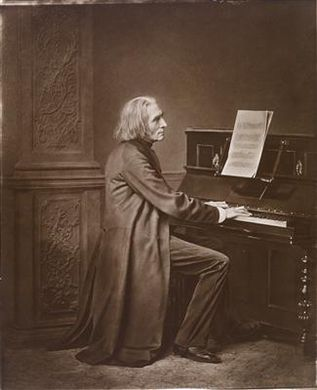 Franz Liszt, Pigmentdruck, Prägestempel: F. Hanfstaengl München 1912, 25,5x 21 cm